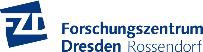 Logo-fzd